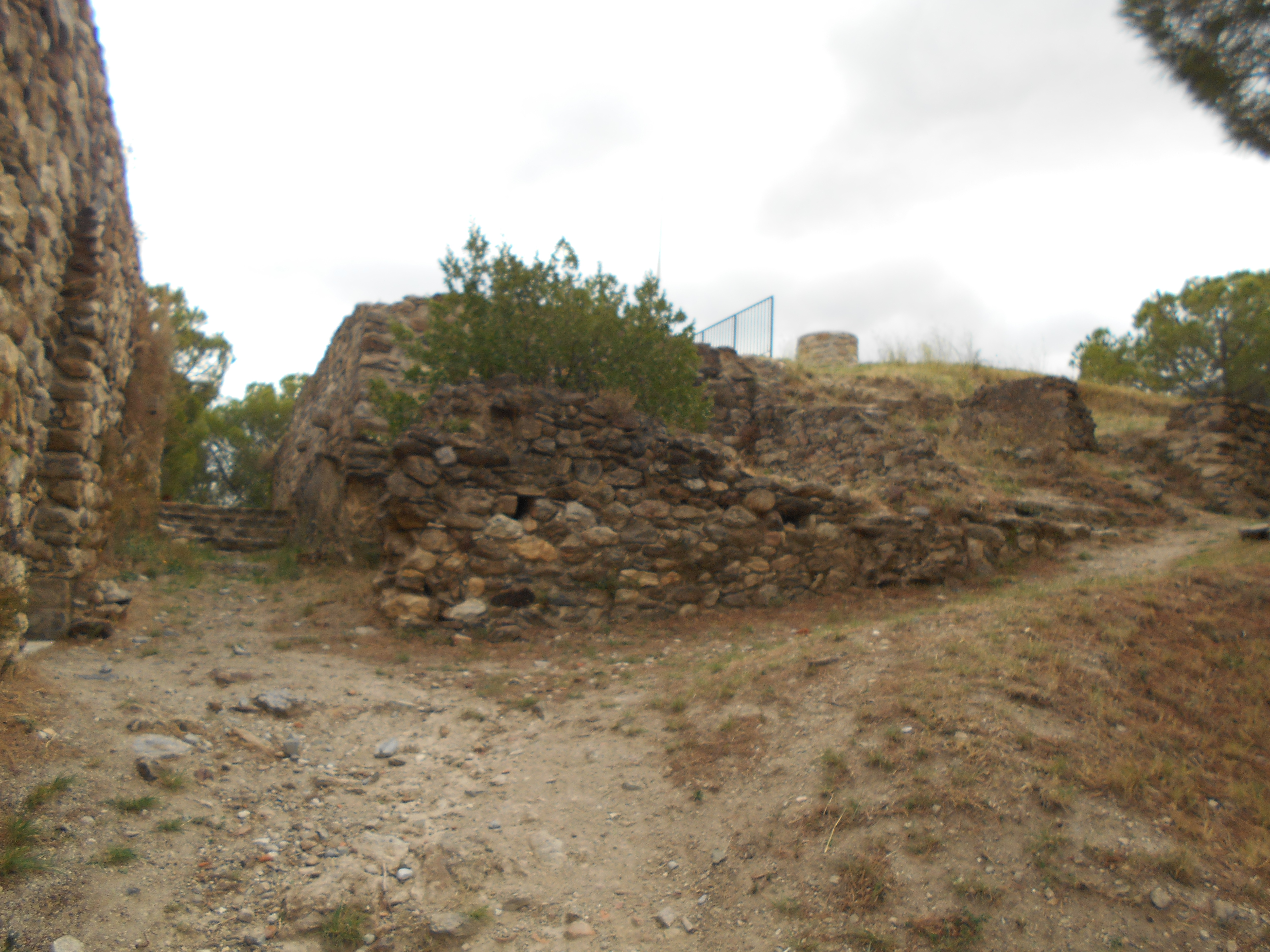 Castell de Montesquiu d'Albera